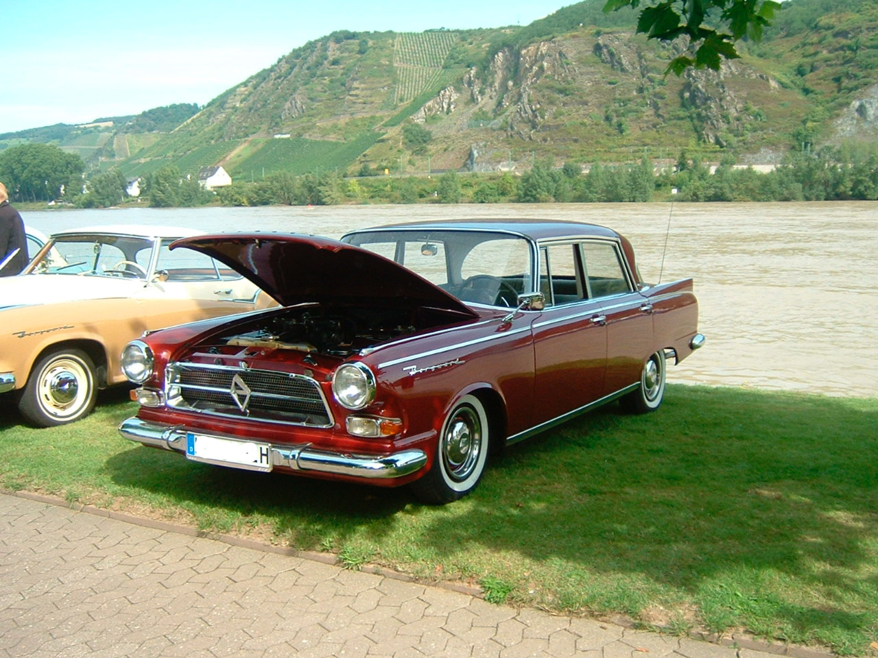 Beschreibung: Großer Borgward Quelle: eigenes Bild Daten: 2005 Autor: F.Lang